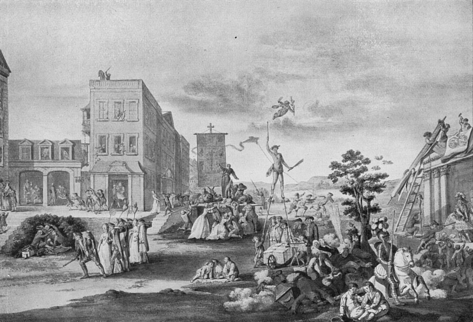 Das Neueste von Plundersweilern gemalt von Georg Melchior Kraus Aquarell, Goethe Nationalmuseum in Weimar (1932)